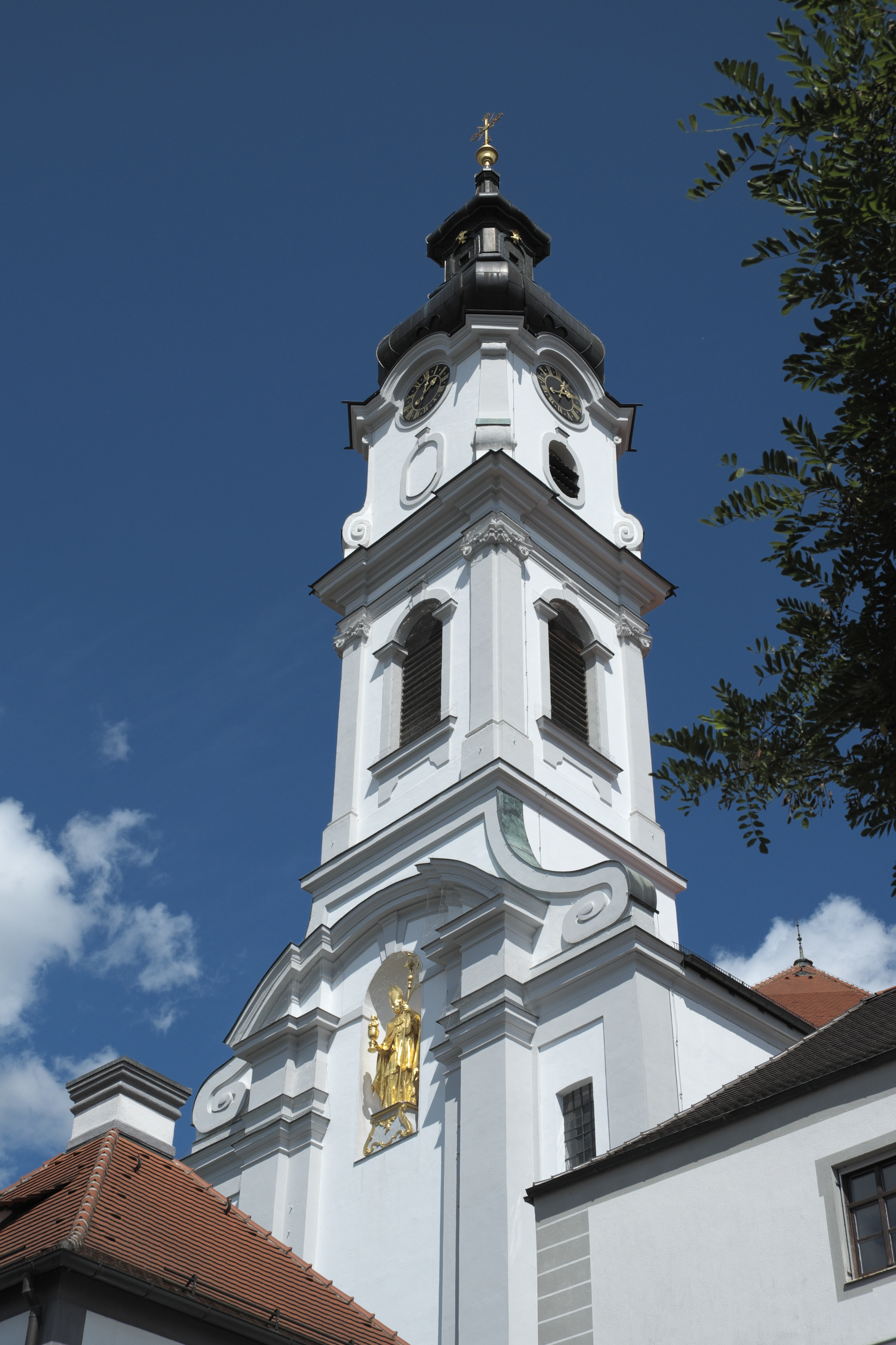 Katholische Pfarr- und Klosterkirche St. Alto und St. Birgitta in Altomünster im Landkreis Dachau (Bayern), Glockenturm und Skulptur des hl. Alto